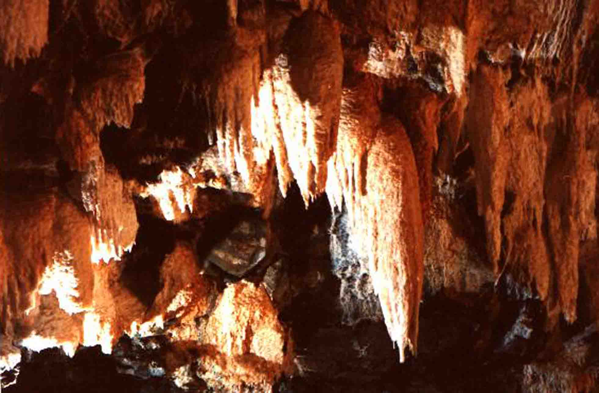 Formações de estalactites no Algar do Carvão, Ilha Terceira, Açores - Portugal.